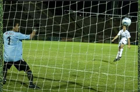 Martin Gimenez- Quilmes